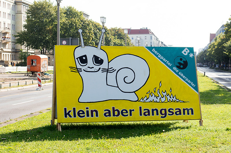 Poster "Klein aber langsam" der Bergpartei